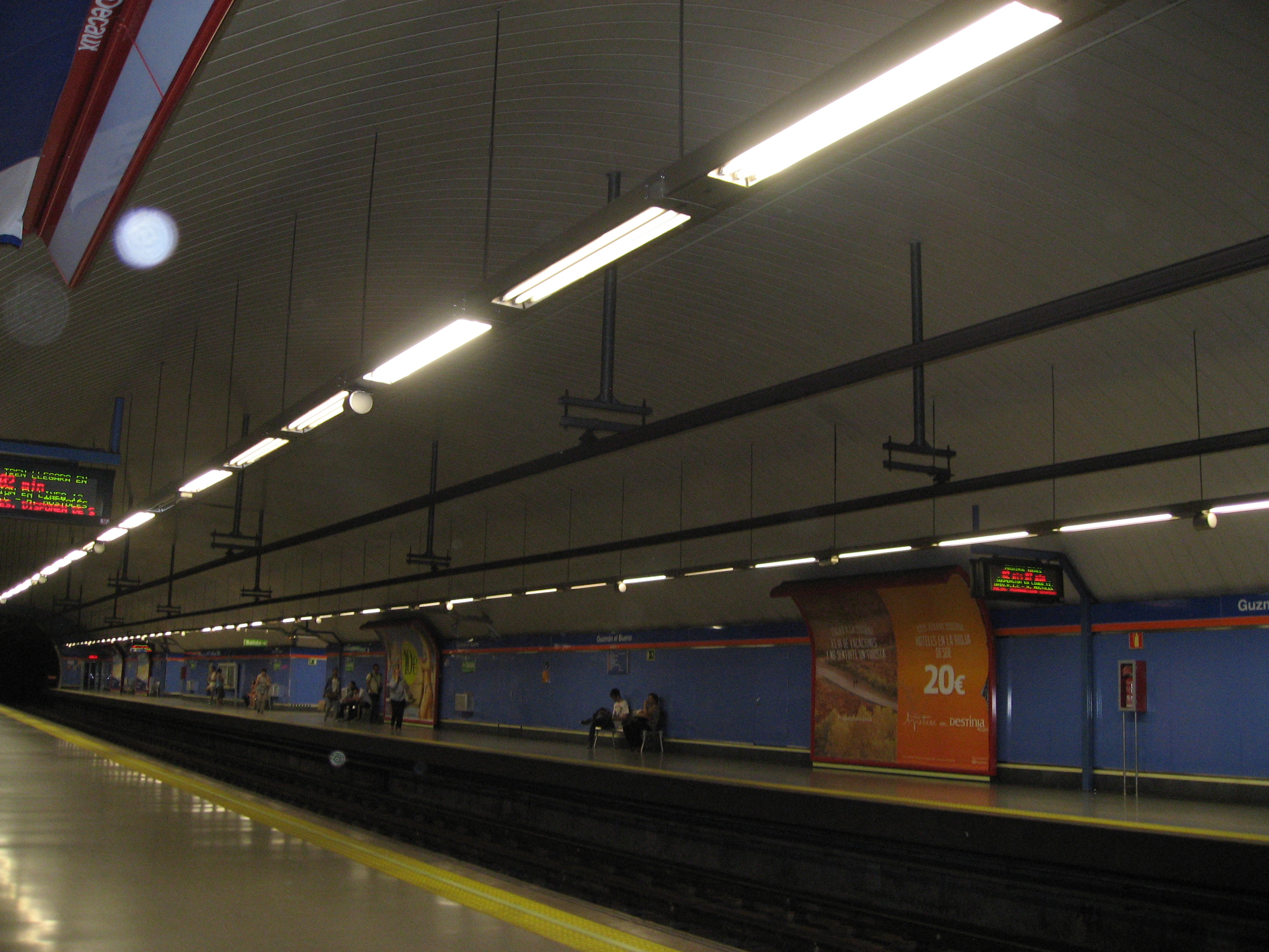 Vista de los andenes de la línea 7 en la estación de Gúzman el Bueno